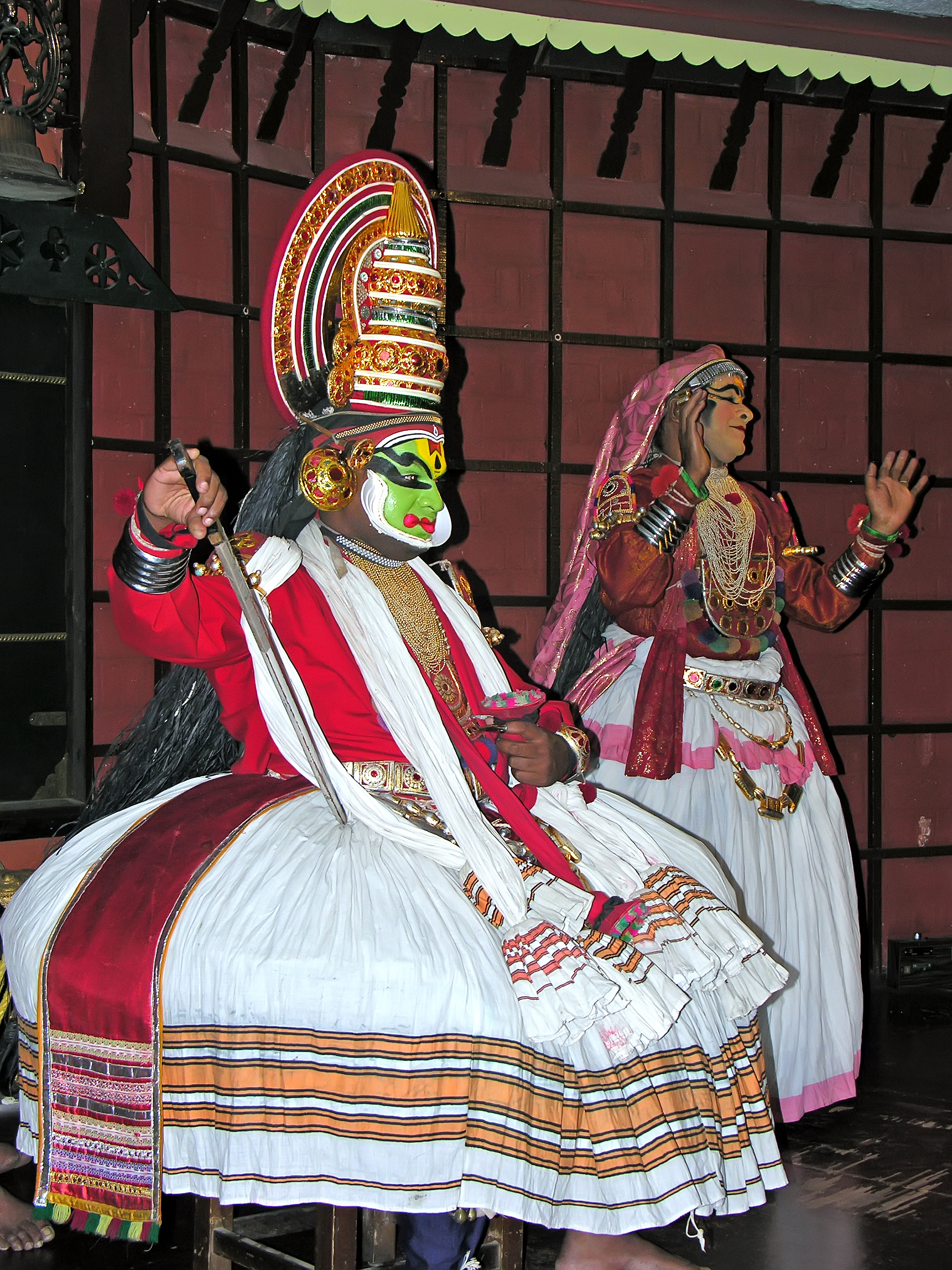 India-7644